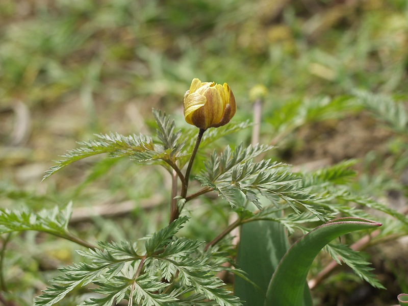 Adonis Amurensis フクジュソウ 側金盞花 福壽草